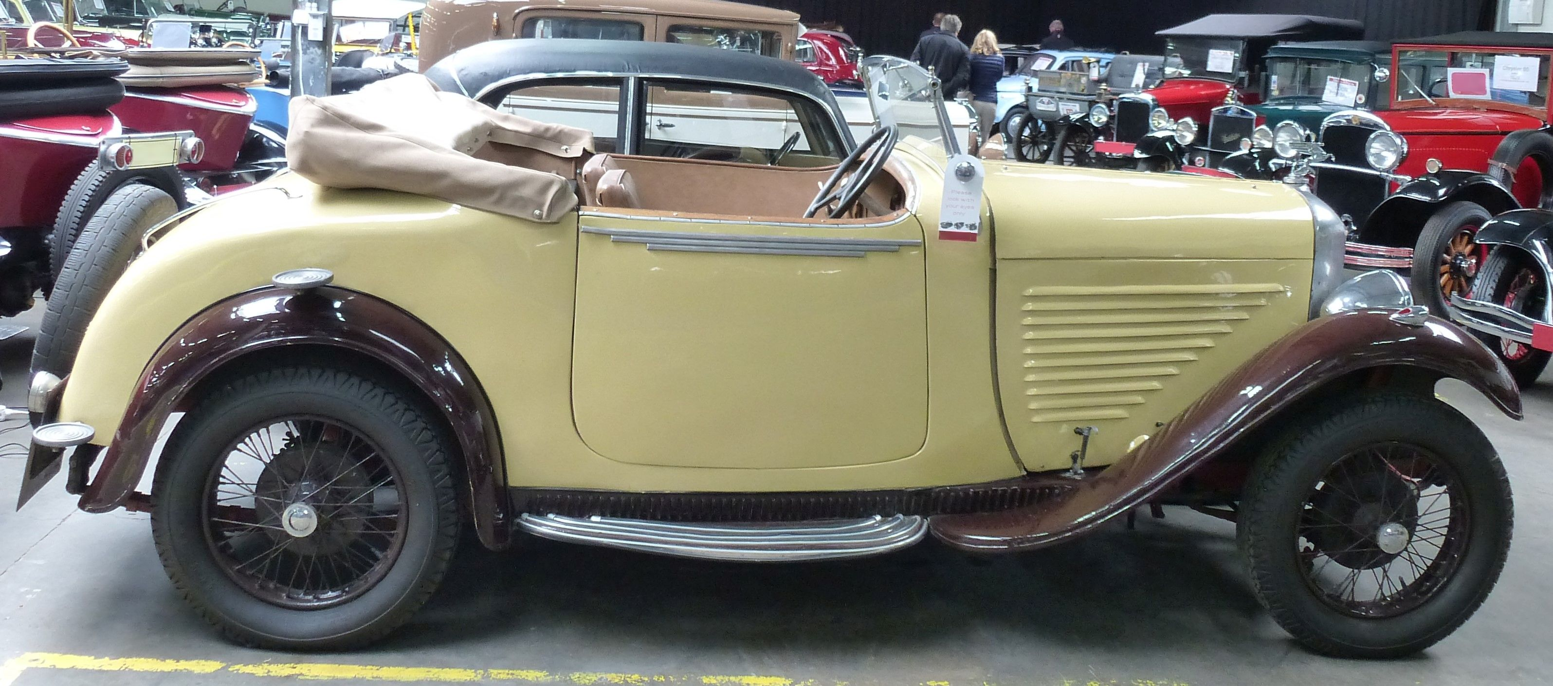 Amilcar Type M 3 Cabriolet 1932